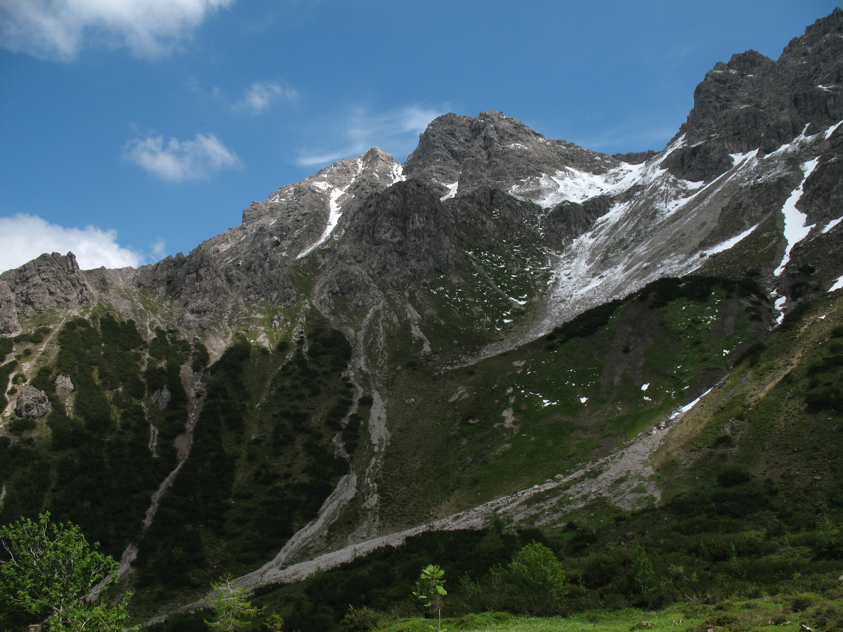 Alpgundkopf (2177 m) von nahe der Kühgundalpe aus gesehen, links davon die Spitze des Griesgundkopfes (2164 m), rechts die Wände des Roßgundkopfes (2139 m).